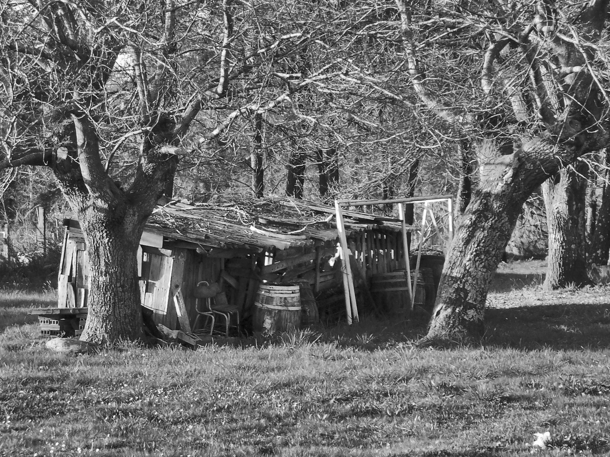 Sisalde (Bertamiráns)